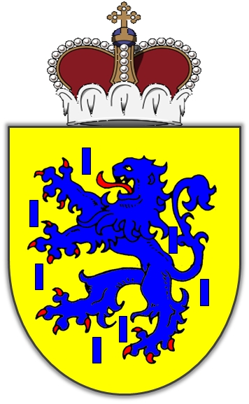 Kleines Wappen der Grafen zu Solms-Laubach